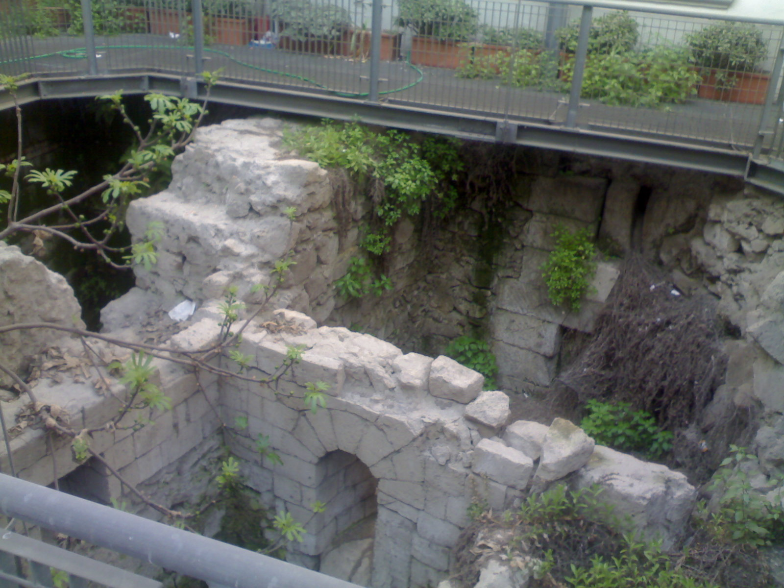 Resti antichi greci e medievali a Largo Sant'Aniello a Caponapoli.